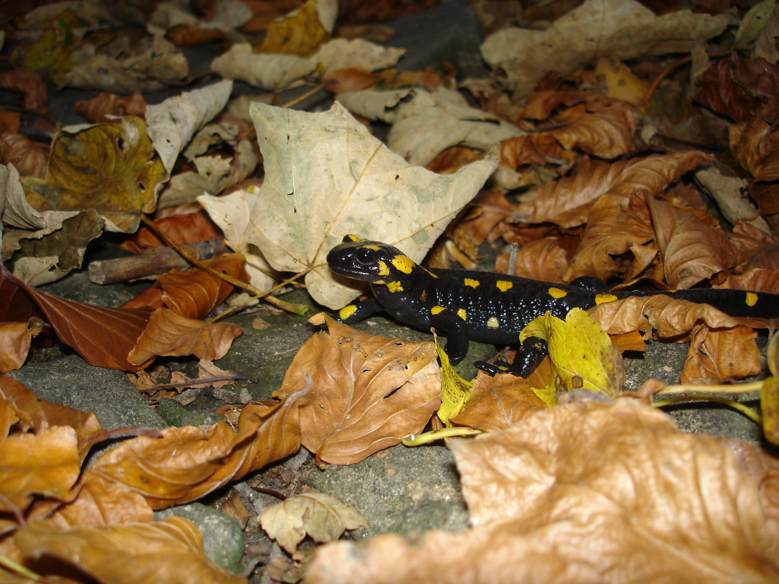 Salamander - Salamandra salamandra in Vitosha, Bulgaria